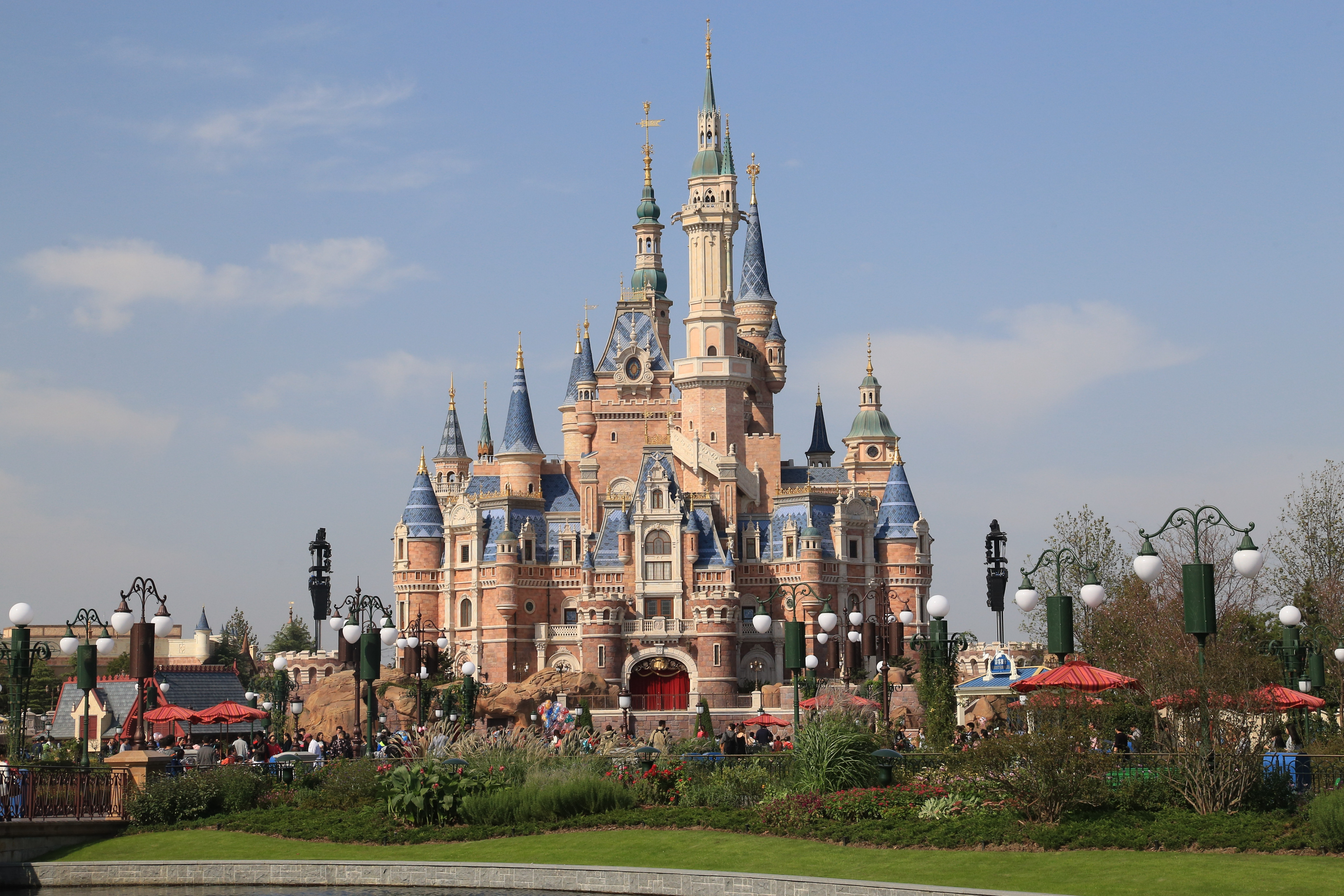 上海迪士尼乐园奇幻童话城堡正面